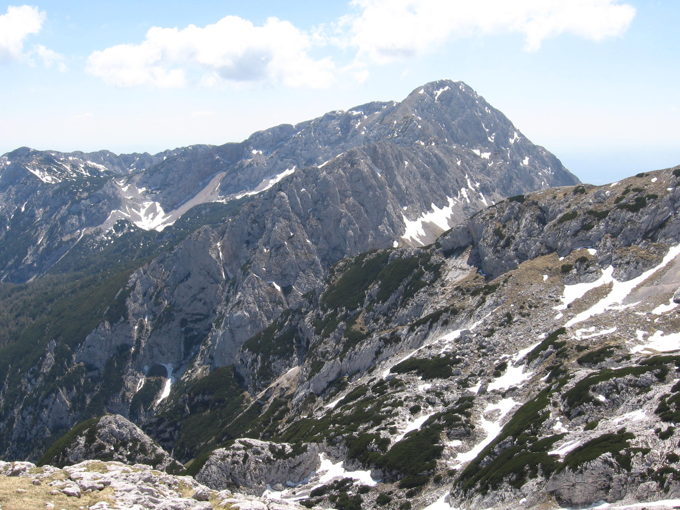 Mt. Kalški greben (ridge) from Kogel (NE), Kamnik Alps